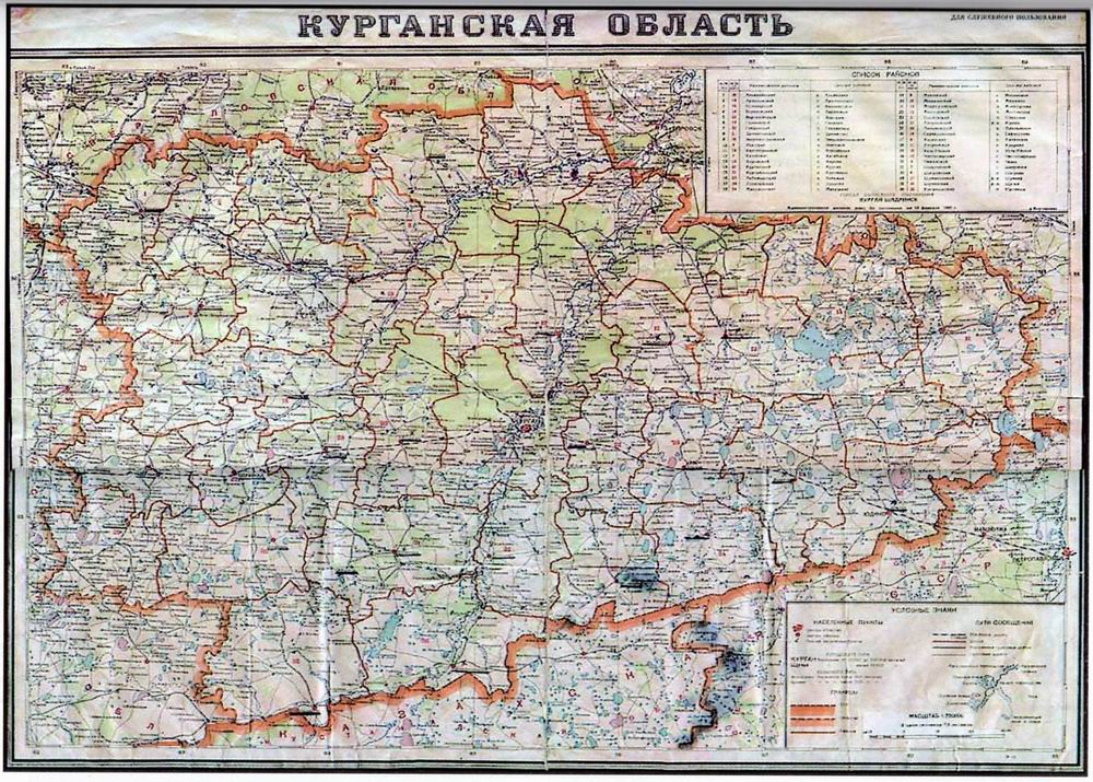 Карта Курганской области